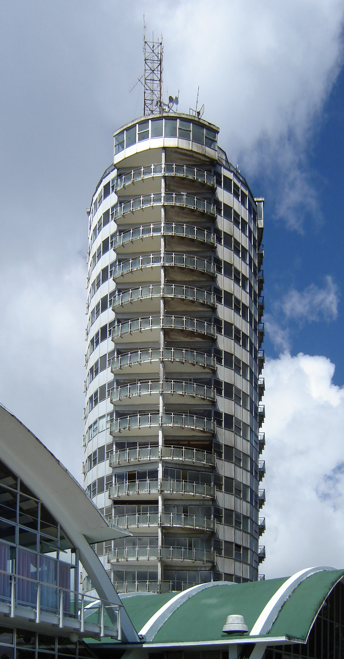 Hotel Humboldt, localizado en la Montaña Waraira Repano